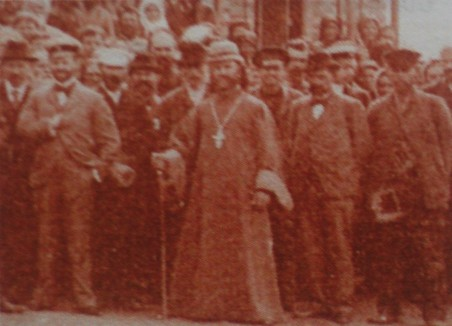 Священник Д И Успенський на фото початок 20 ст